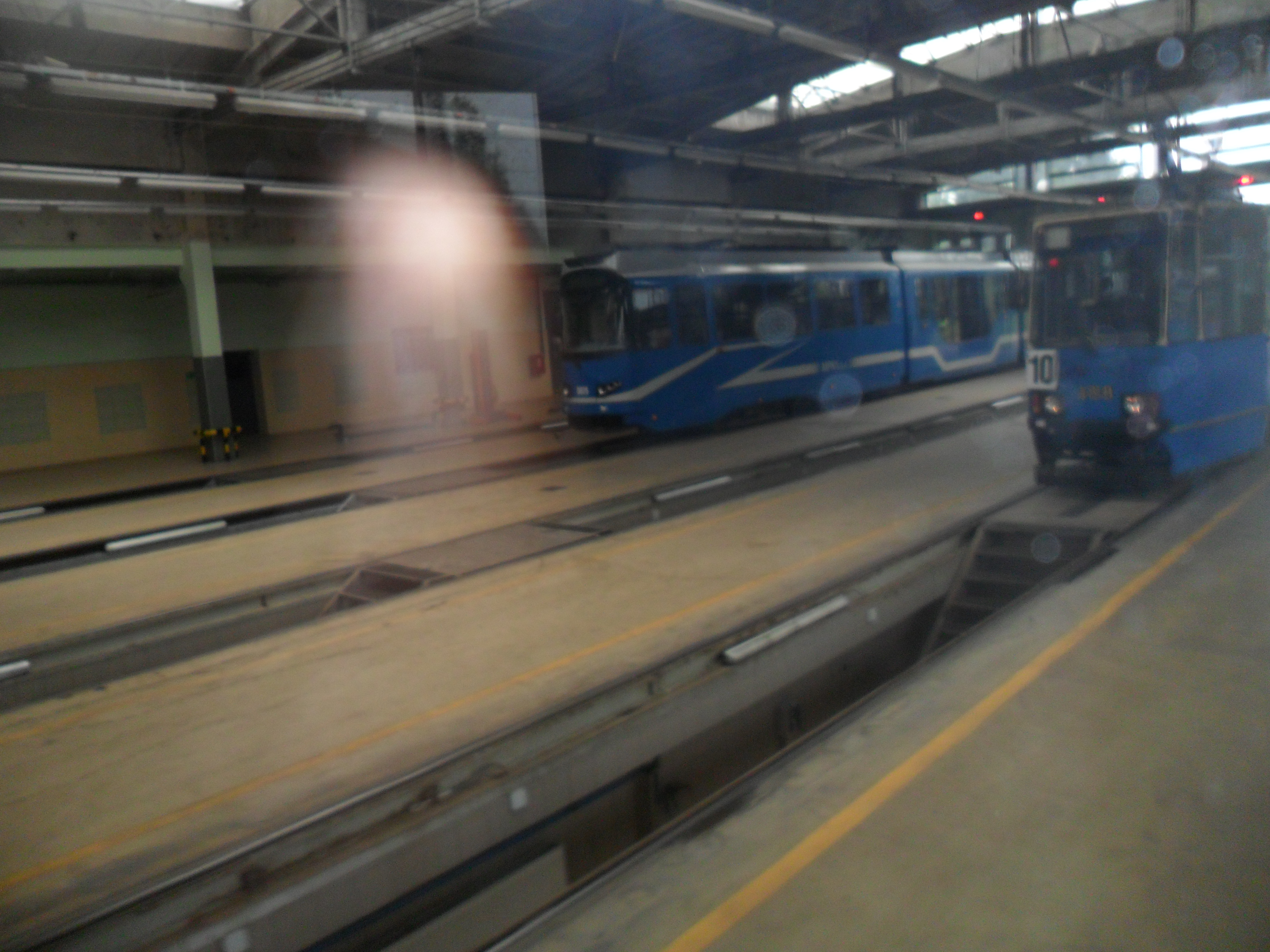 Główna hala zajezdni w Nowej Hucie